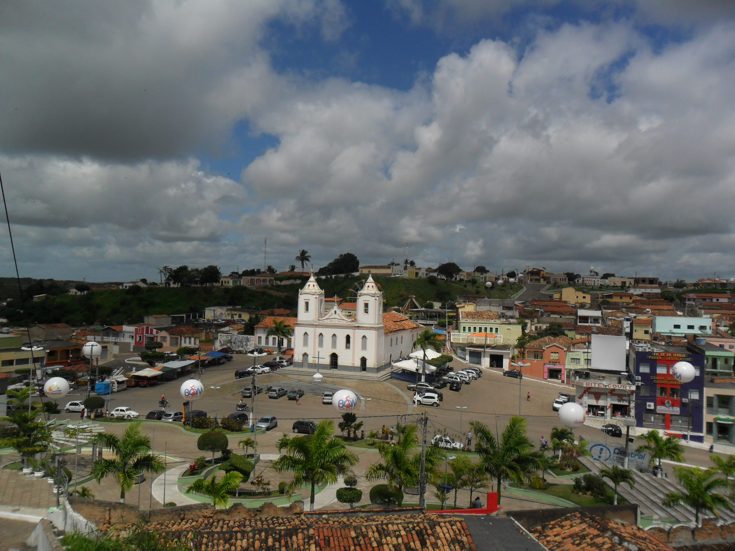 Centro da cidade.